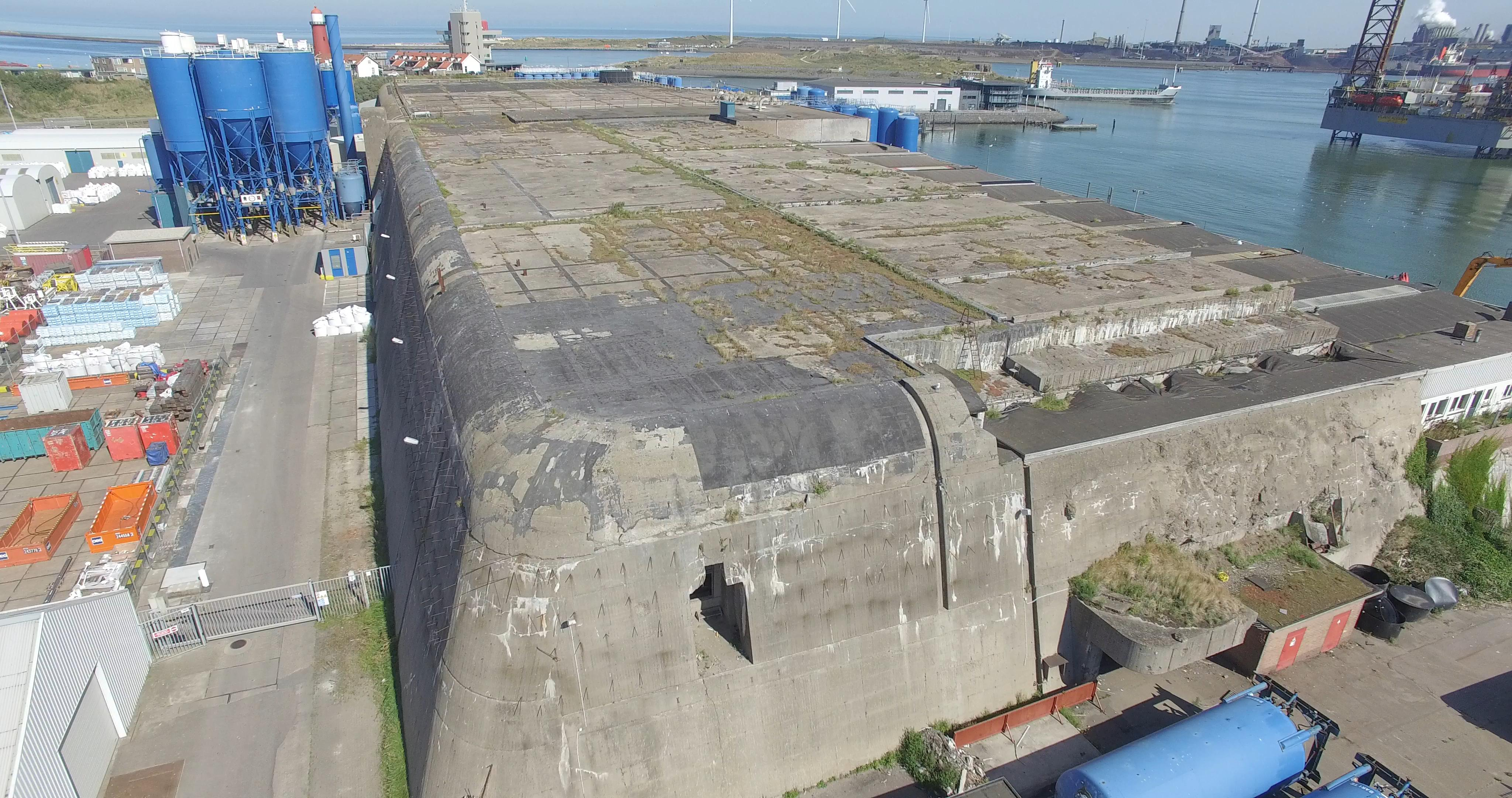 Bunker voor onderzeeboten in IJmuiden. Nu in gebruik als loods.